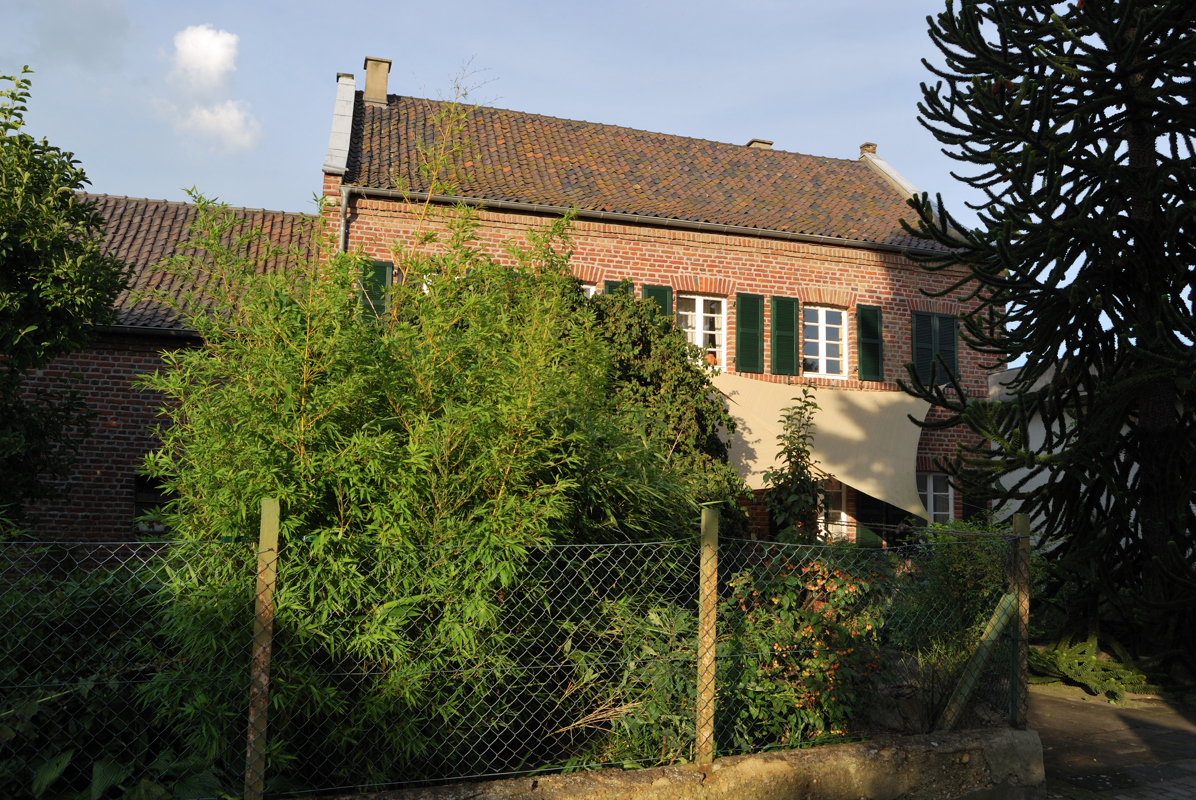 In der Mitte 16; Denkmalnummer 109